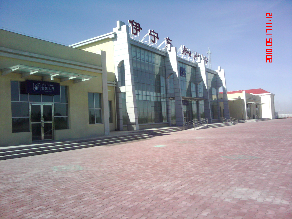 伊宁东站